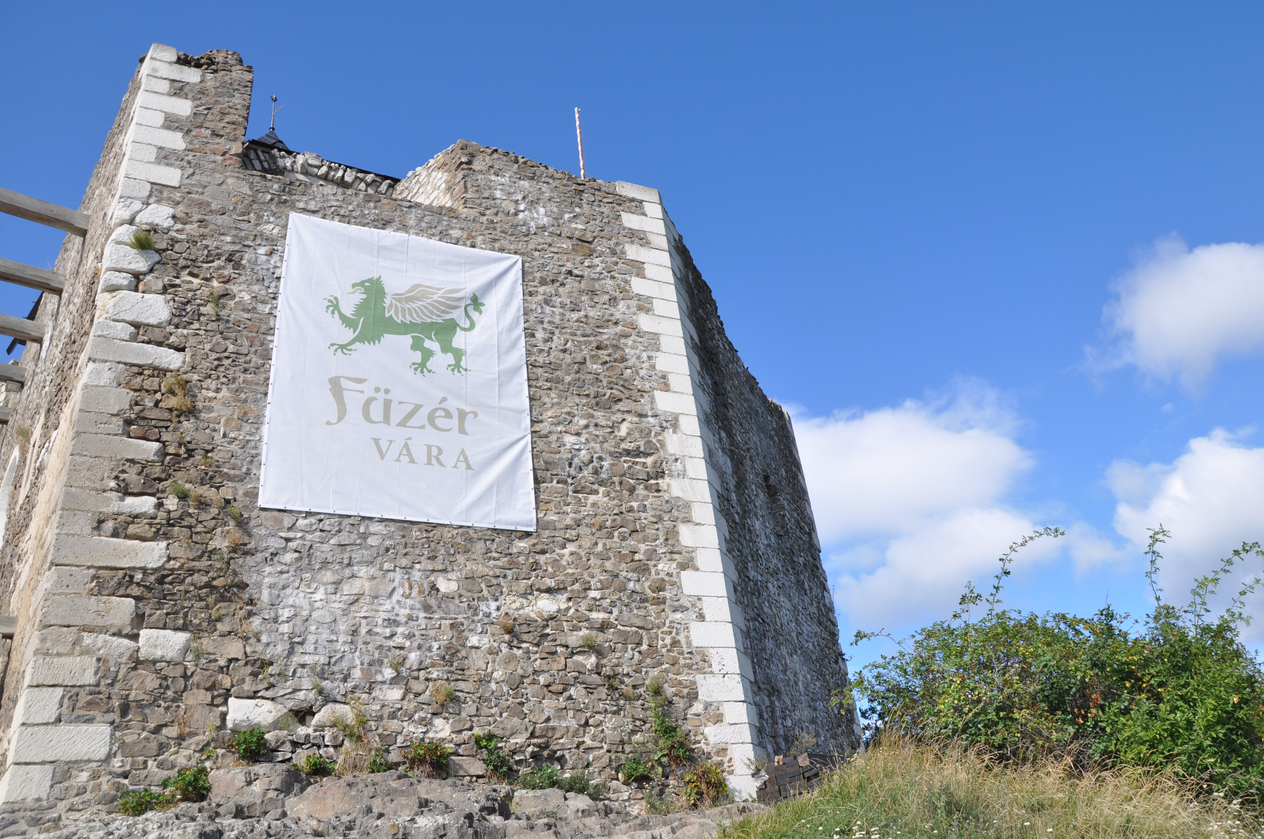 Az újjáépült Füzér vára, felső-vár várkapu